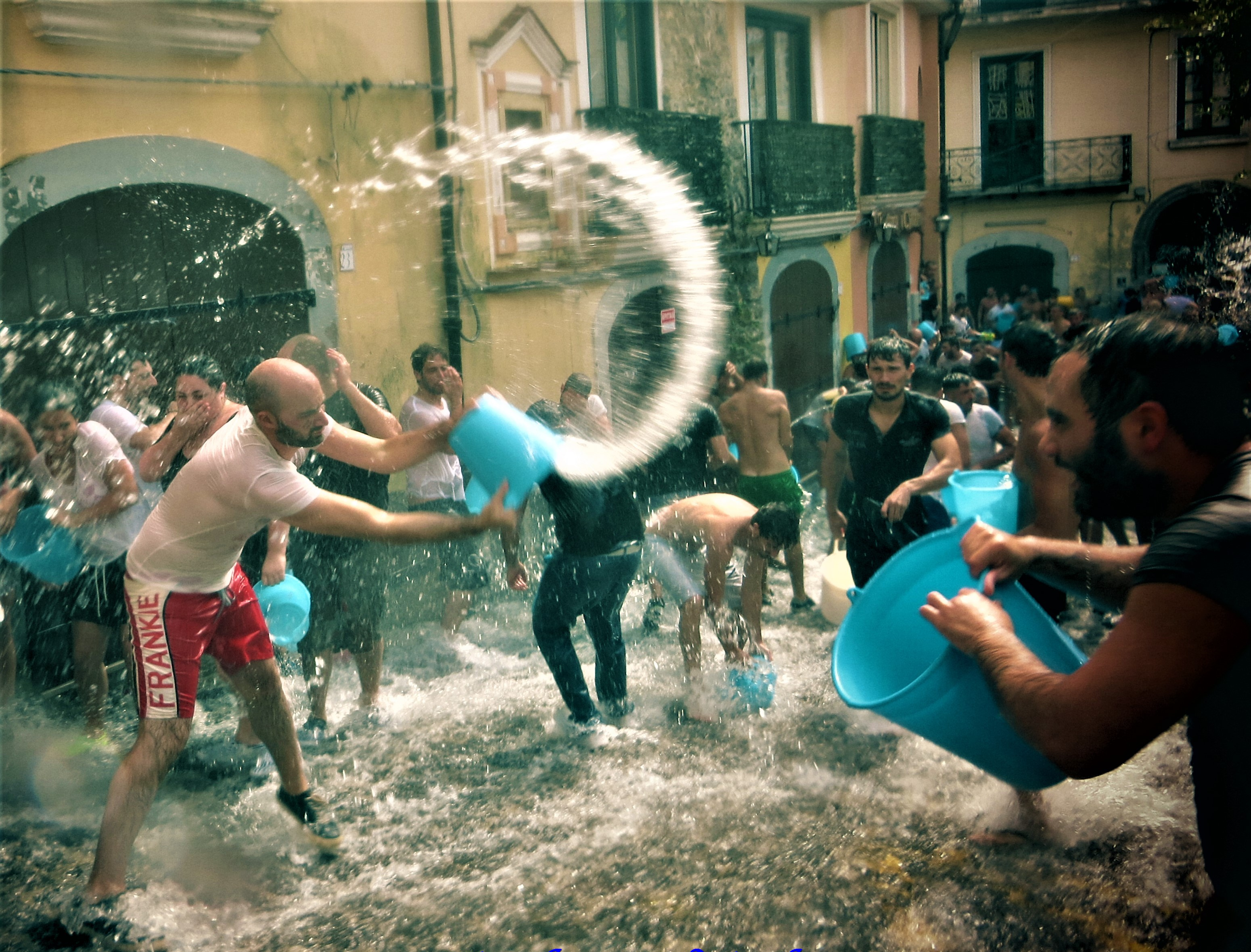 Chiena di Campagna 2016 Napulitano: 'A secchiata d' 'a Chiena (Campagna)